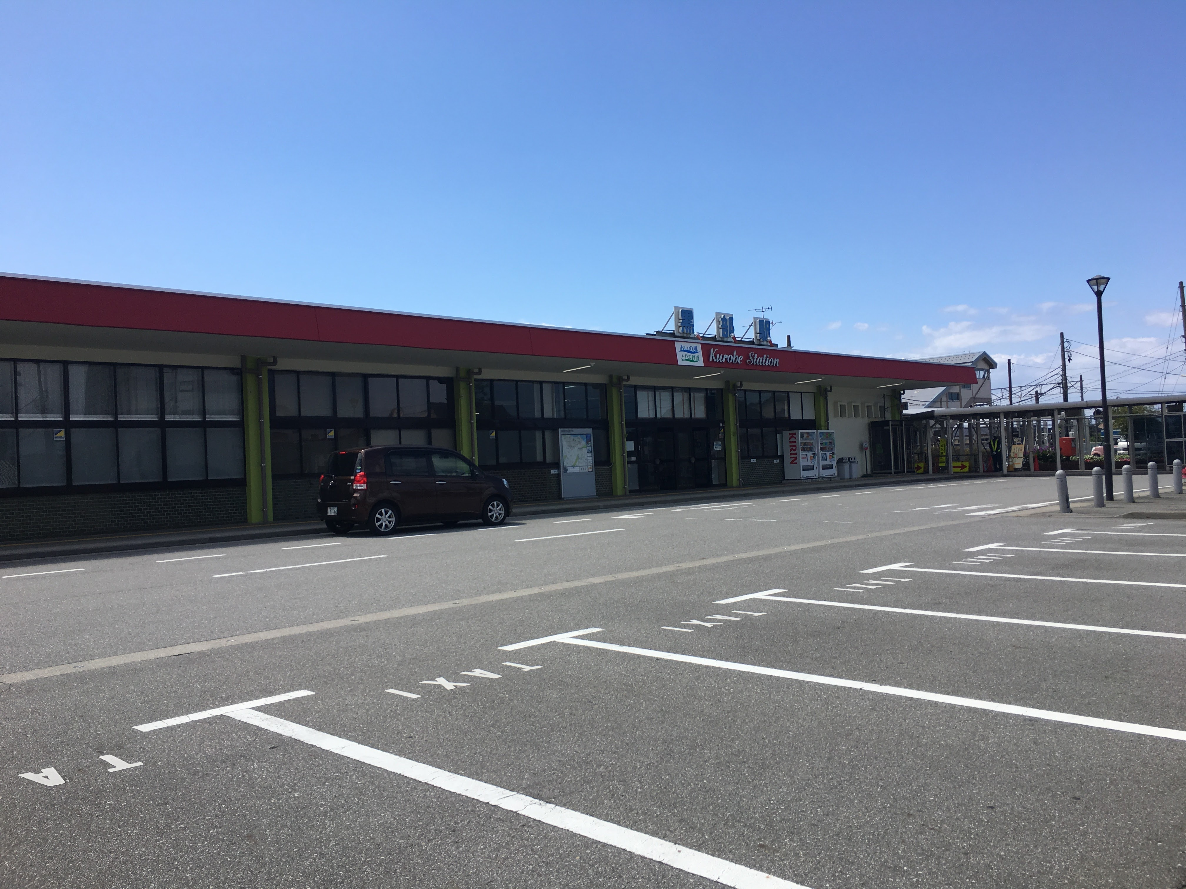 黒部駅駅舎